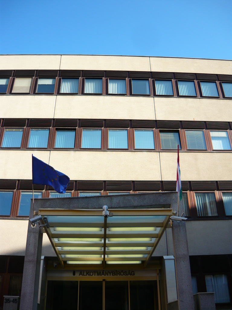 The office of the Constitutional Court of Hungary. - Budapest, I. Donáti utca. 35-45.